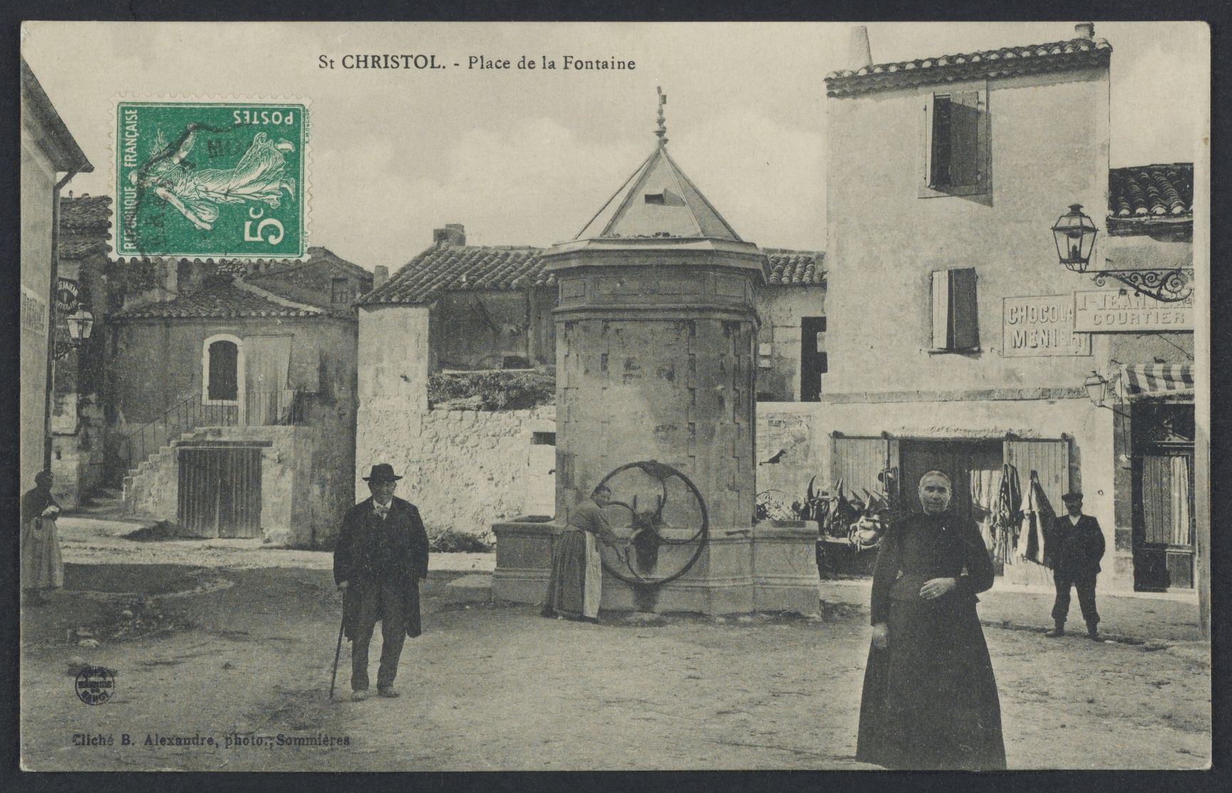 Saint-Christol. - Place de la Fontaine : carte postale (1ère moitié du XXe siècle)